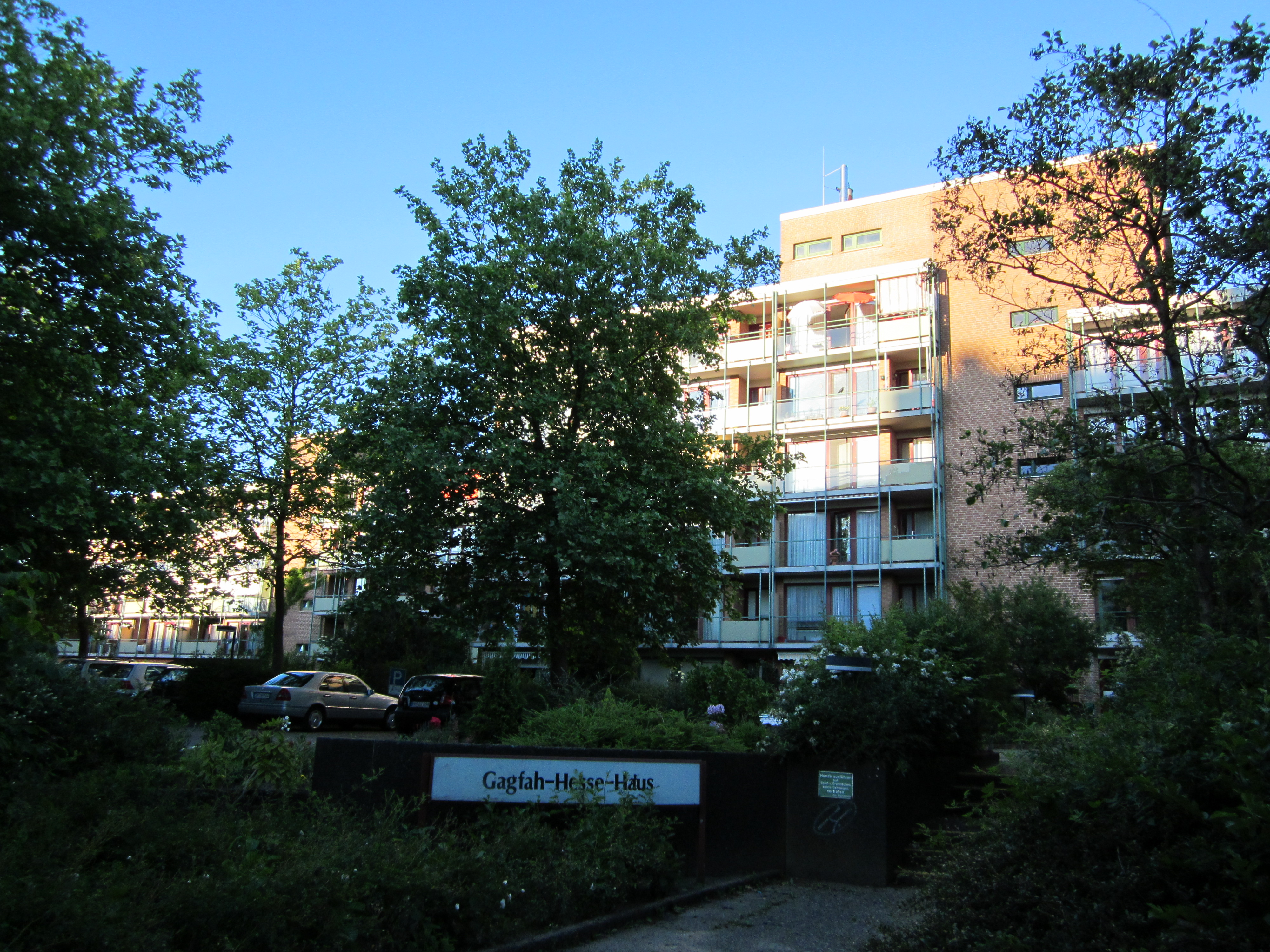 Das Gagfah-Hesse-Haus der Hartwig-Hesse-Stiftung im Gustav-Seitz-Weg in Steilshoop wird von der GAGFAH bewirtschaftet und dient dem betreuten Wohnen.